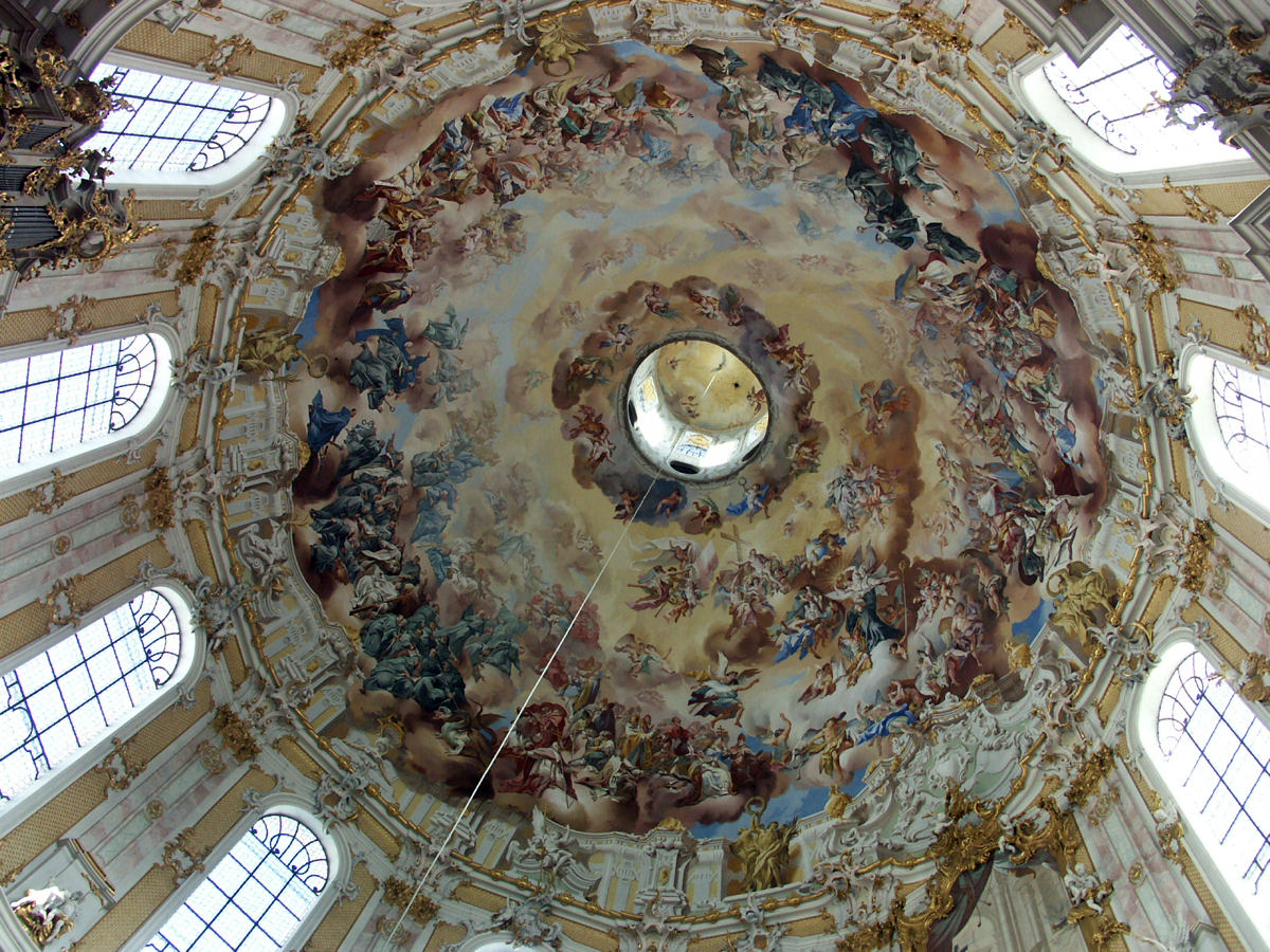 Ettal Abbey, Ettal, Germany